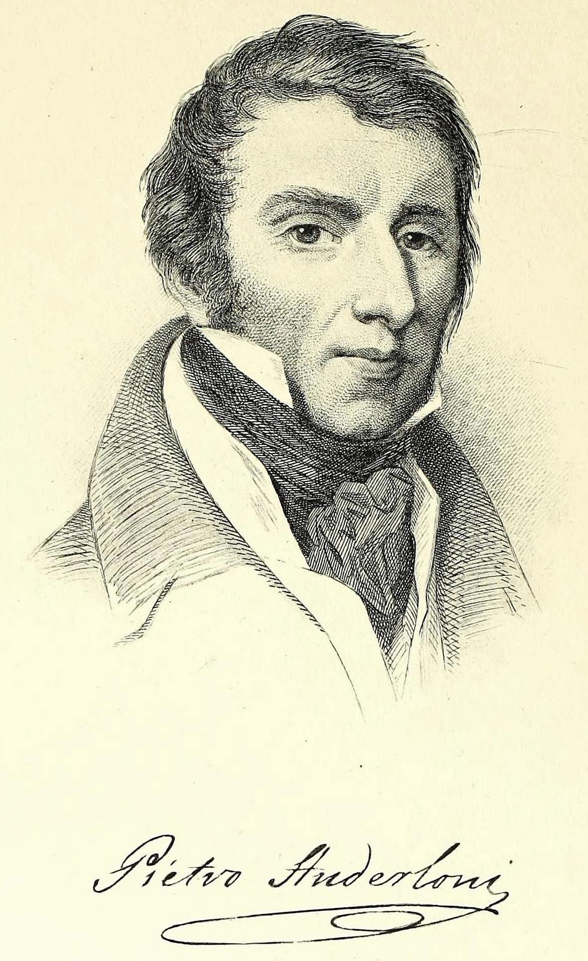 Ritratto di Pietro Anderloni, da un’incisione di Ferdinand Joubert.